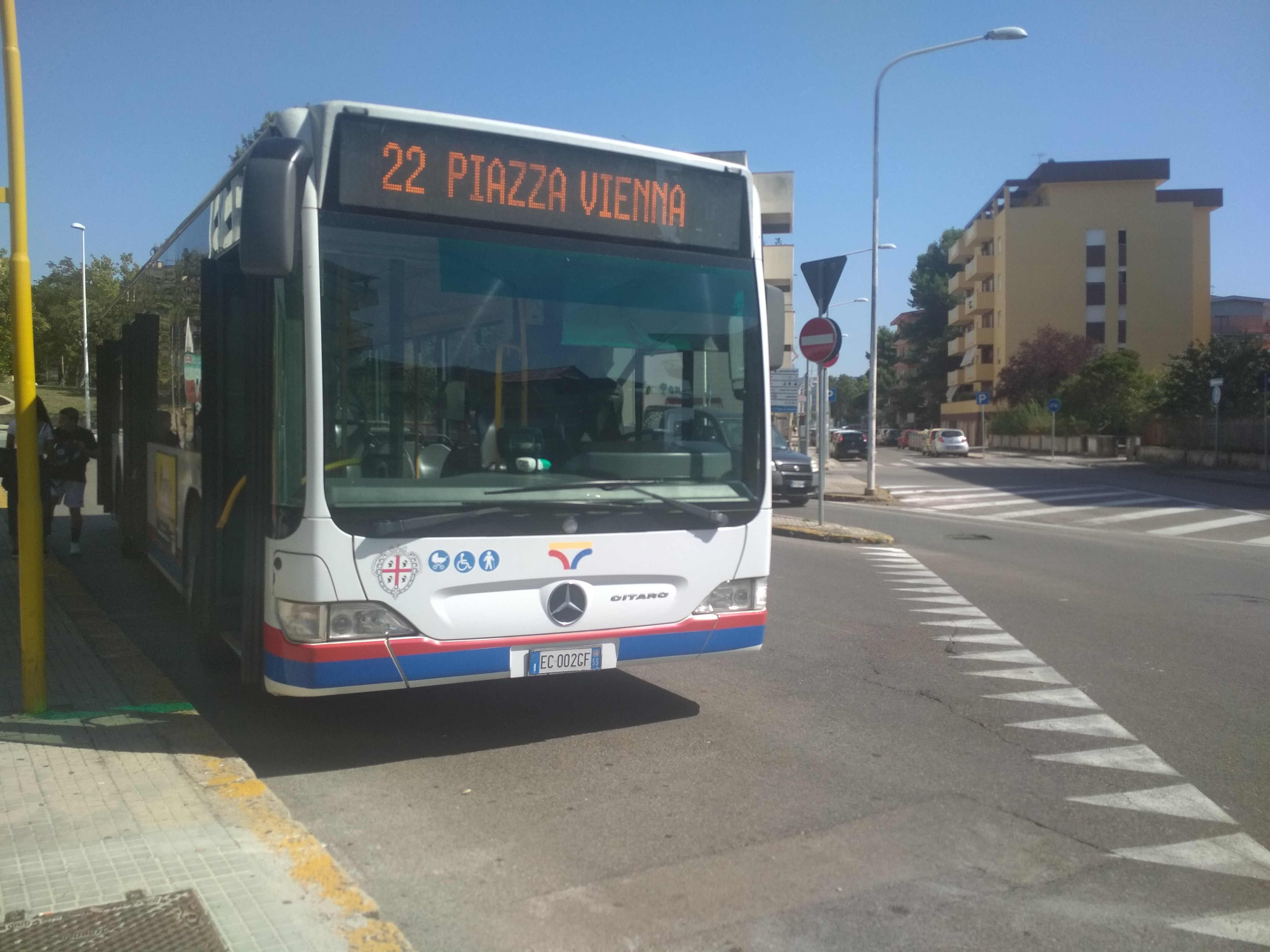 La nuova linea 22 che sosta al capolinea di Piazza Vienna